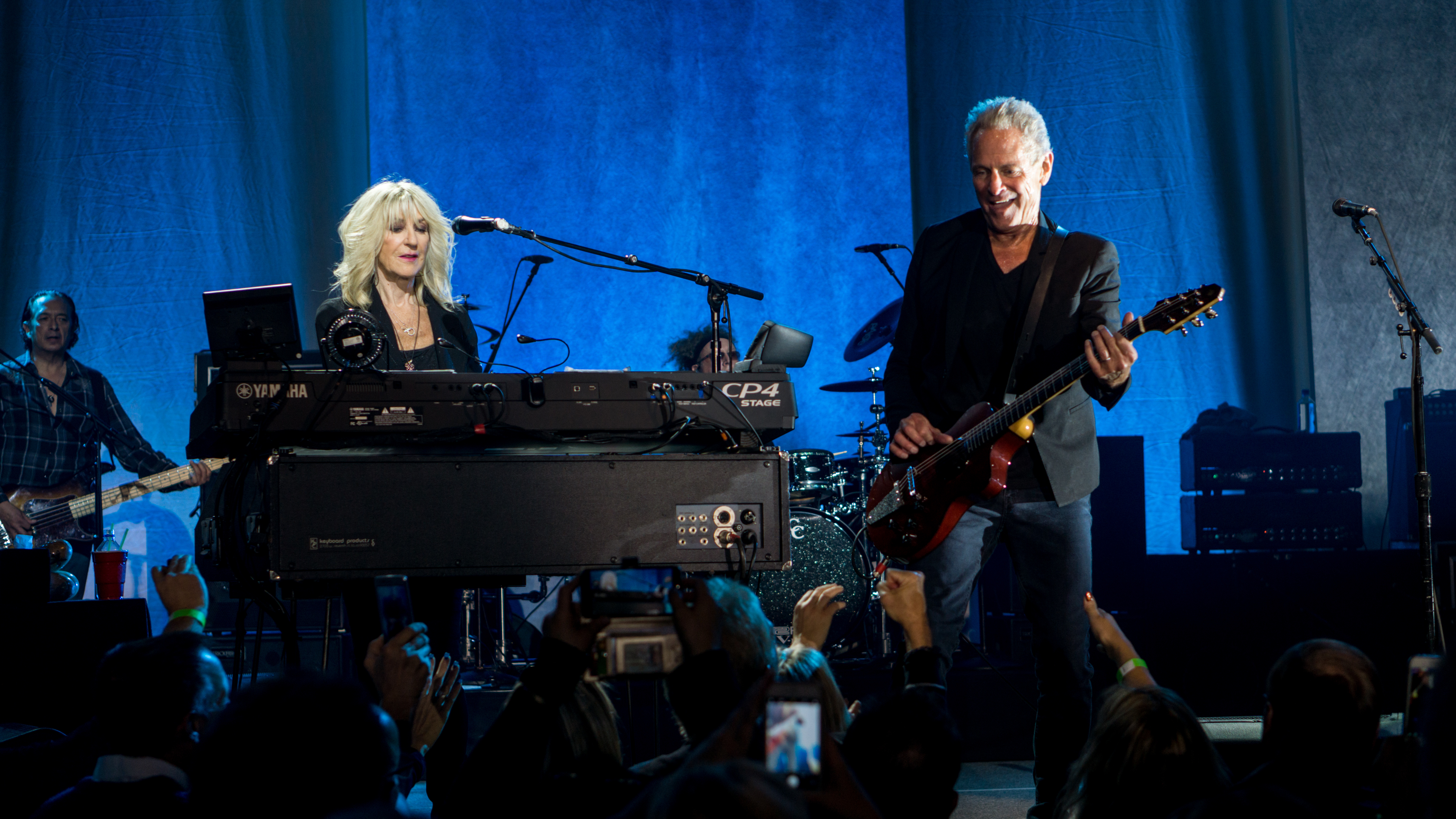 Buckington-McVie 2017